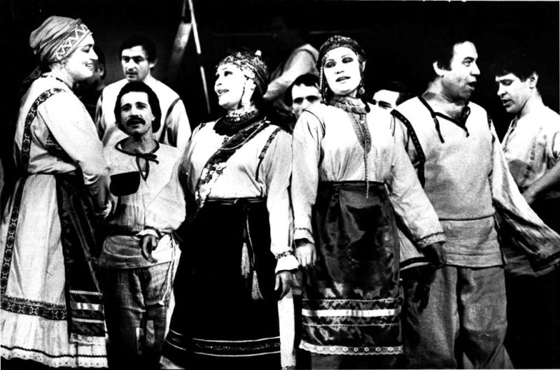 описание